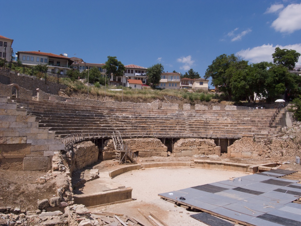 Ohrid, Macedonia